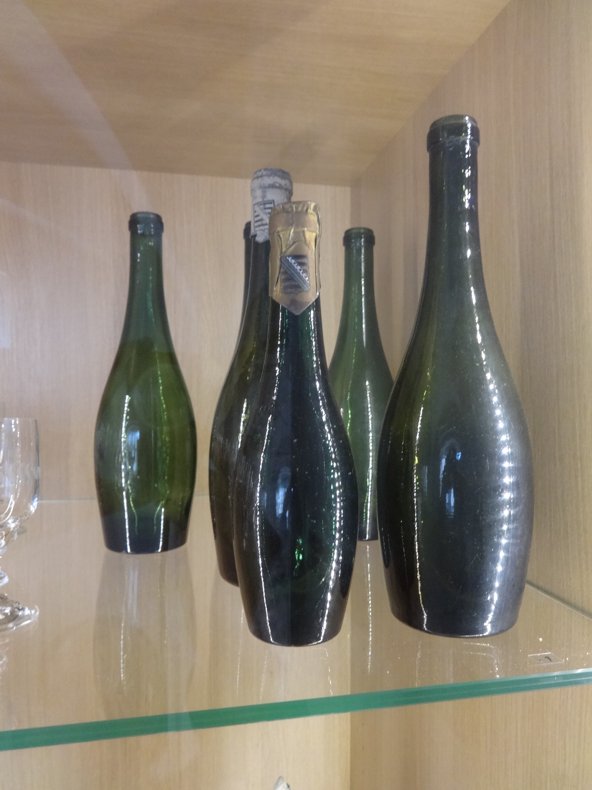 8 Weinflaschen in Form einer Sachsenkeule aus den Jahren 1931 bis 1994; Aufbewahrungsort: Hoflößnitz, Radebeul